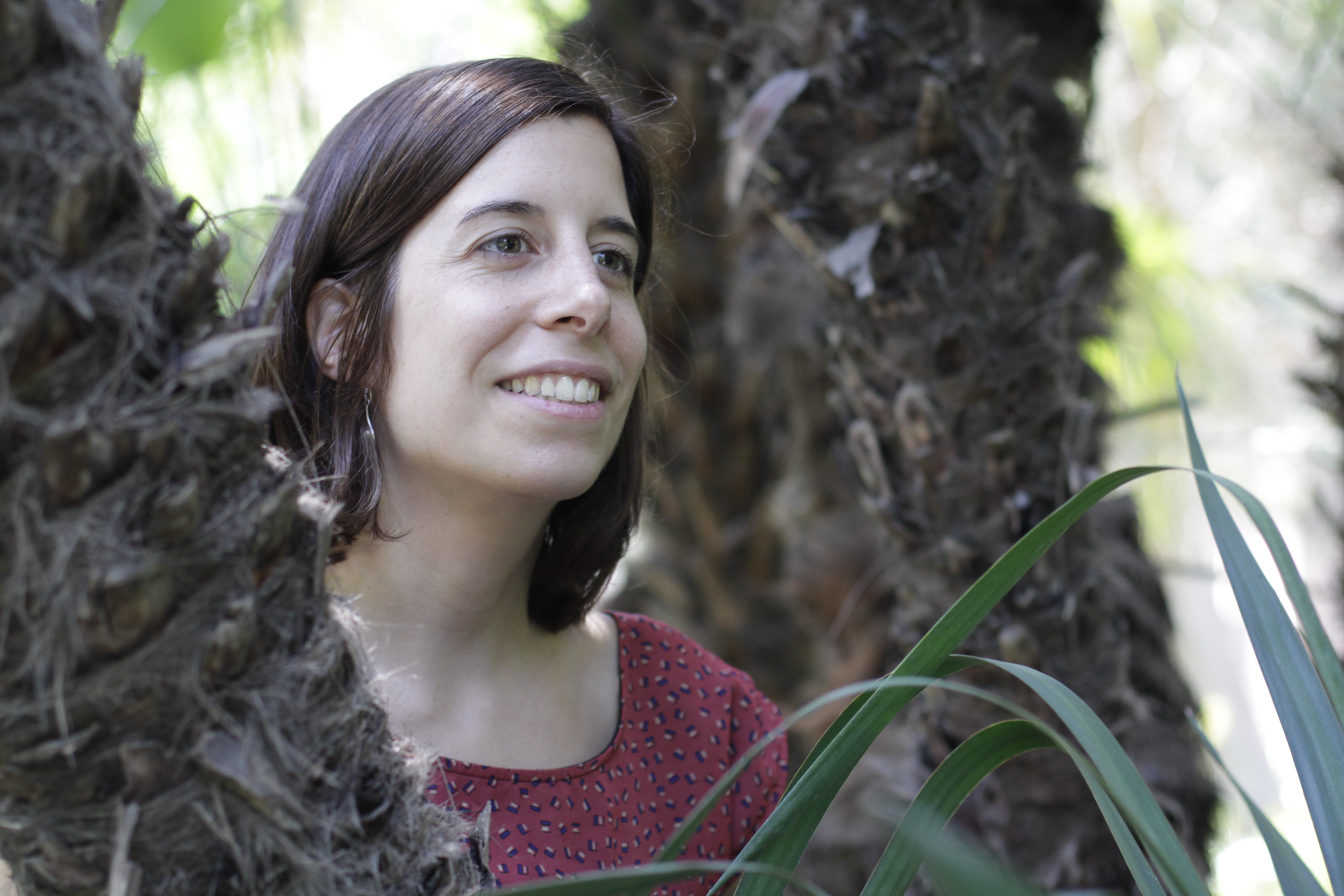 La poeta Anna Gual